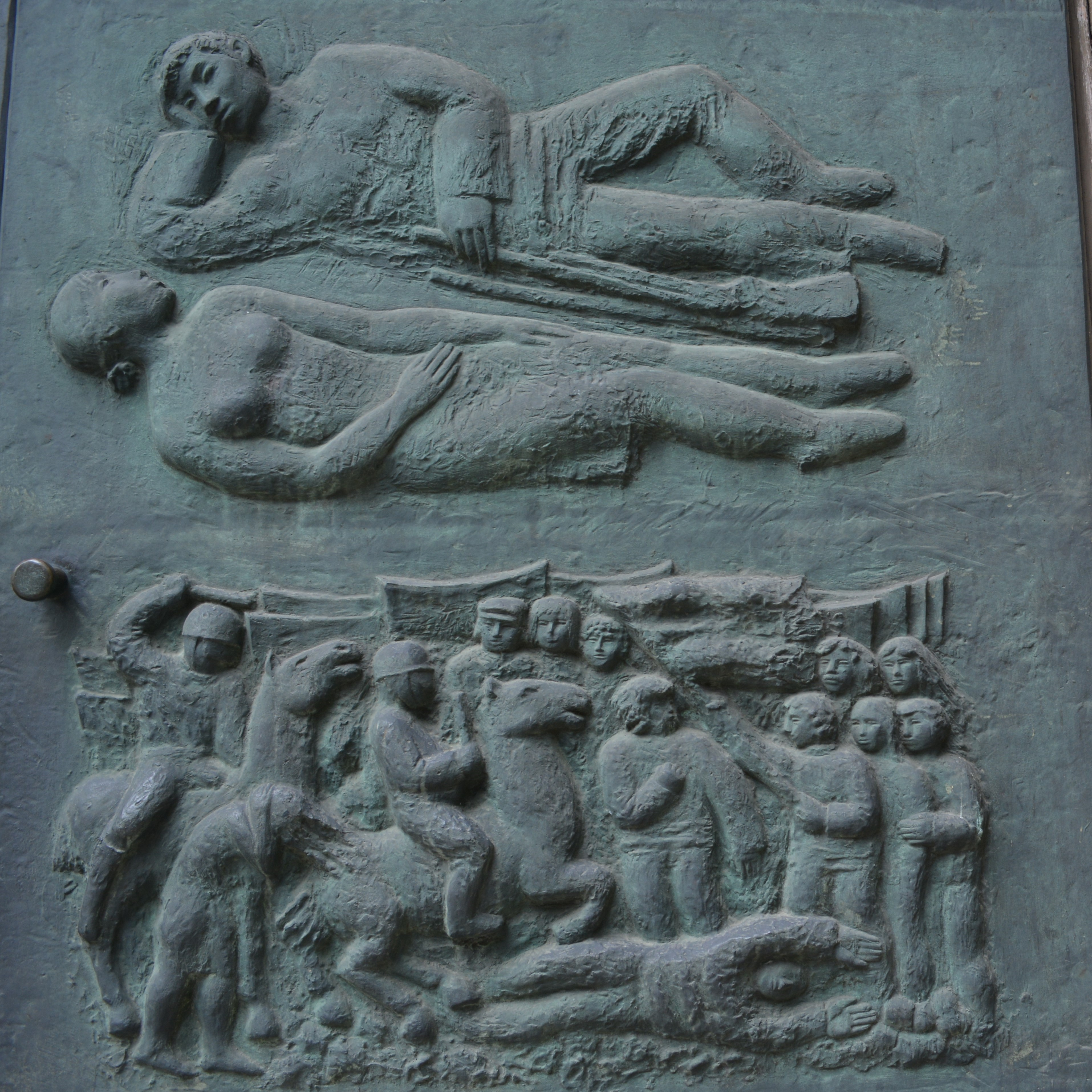 Schmiedeeisernes Portal zum denkmalgeschützten Konzerthaus Carl Philipp Emanuel Bach, der ehemaligen Franziskaner-Klosterkirche